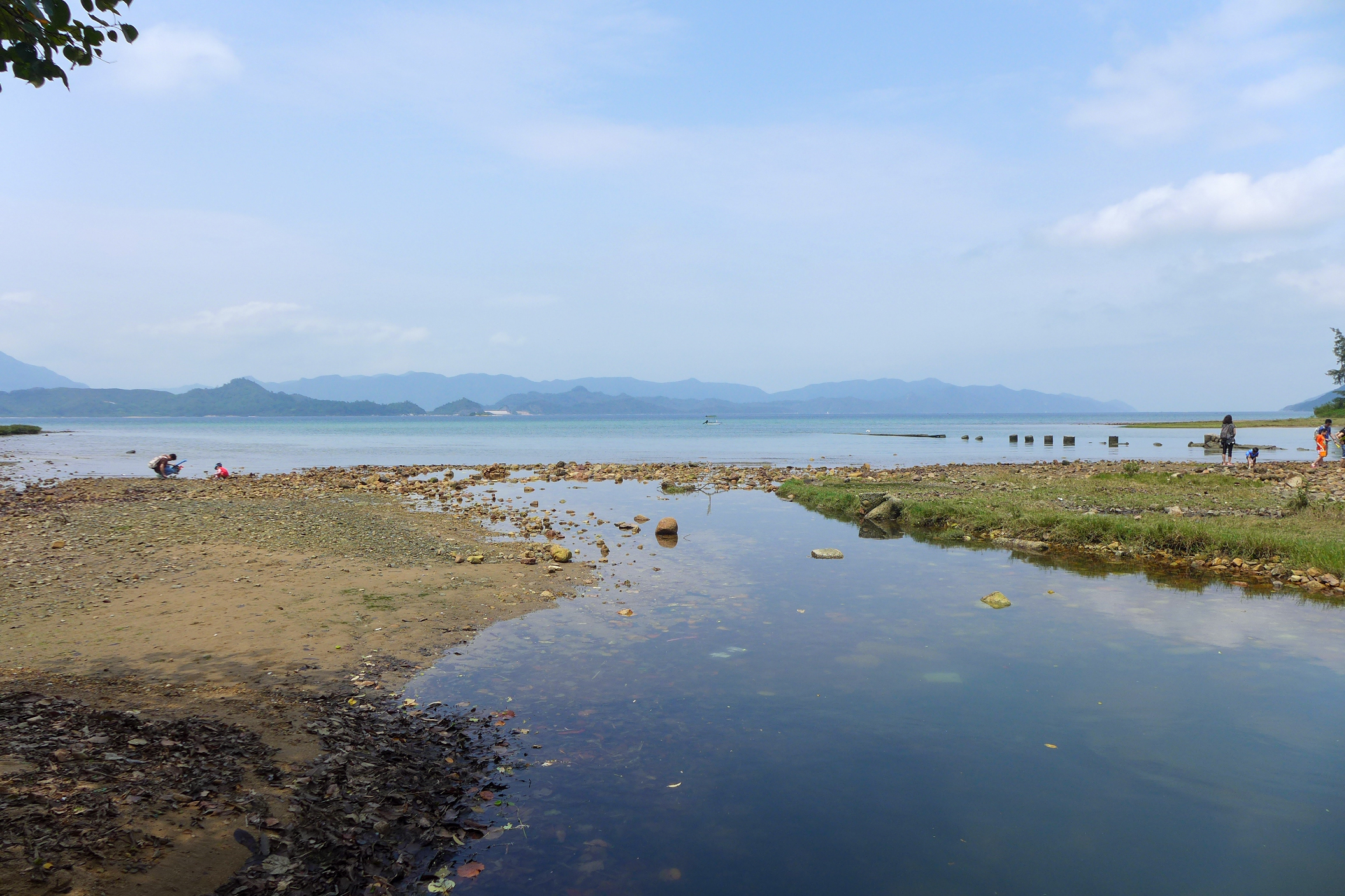 Nai Chung